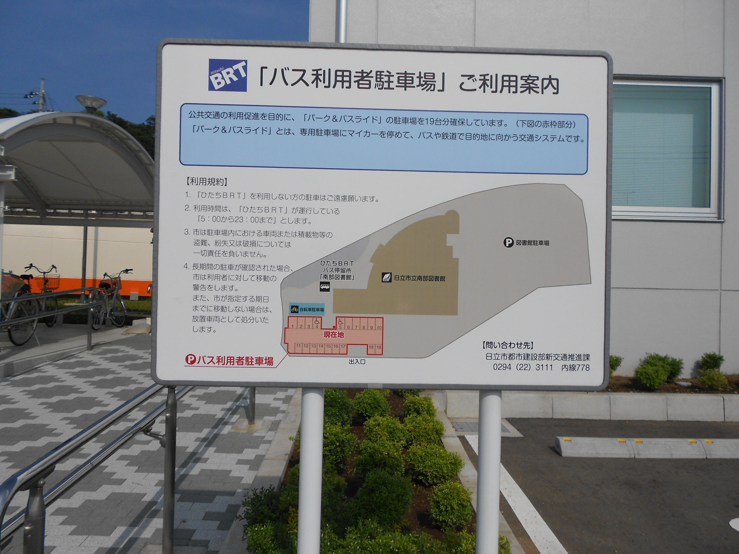 日立市立南部図書館パーク＆バスライド